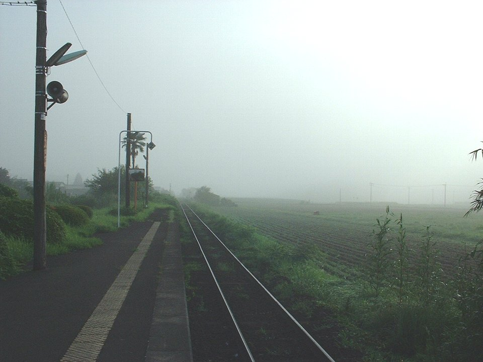 万ヶ塚駅 朝靄のホーム